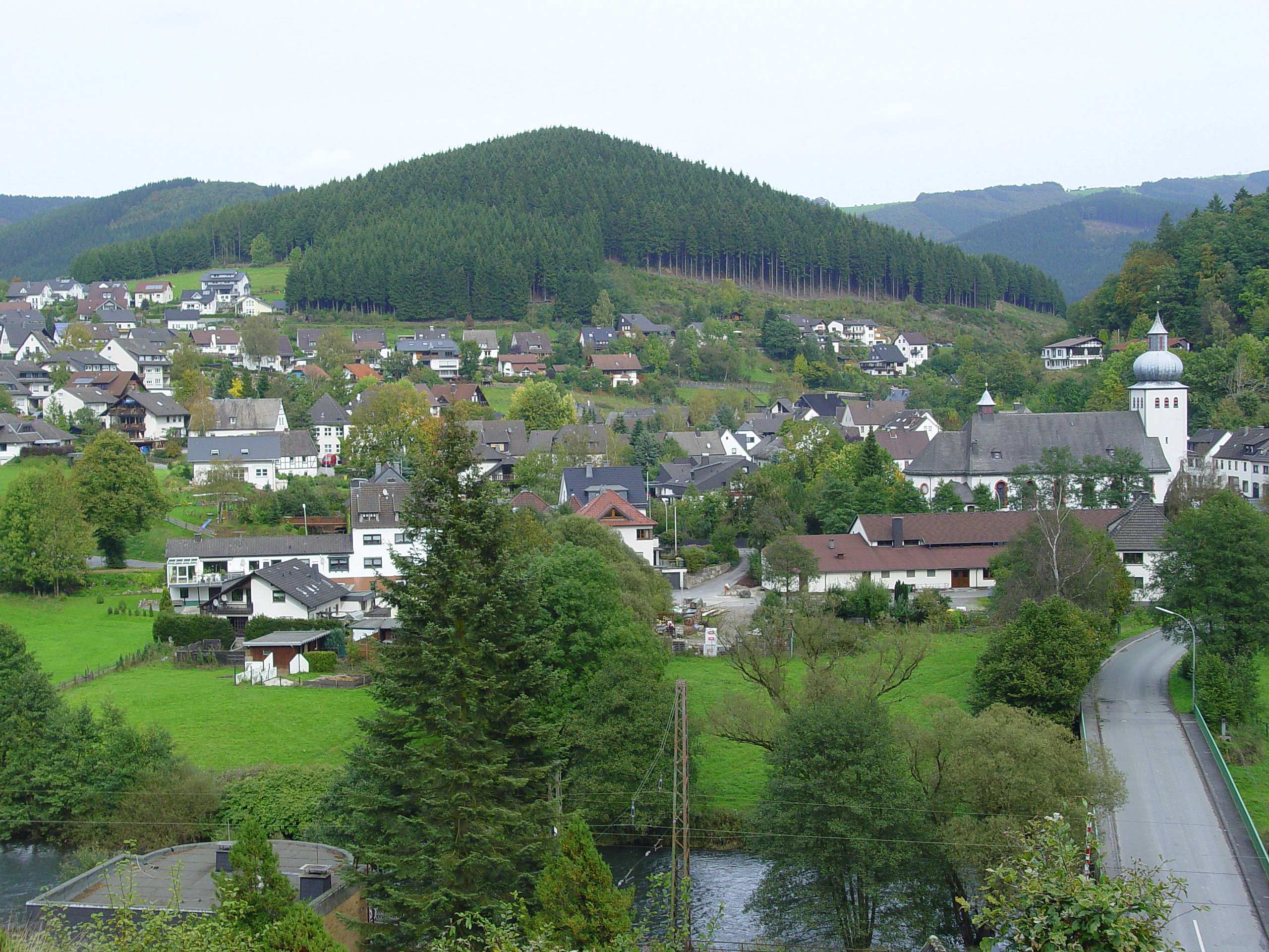 Rönkhausen im Sauerland. Blick vom ehemaligen Bahnhof her.